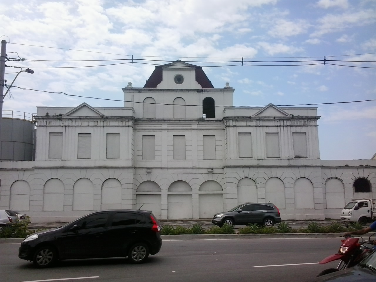 Estação Presidente Dutra. Estação ferroviária da Estrada de Ferro Leopoldina Railway. Praça da Renascença Fluminense. Zona portuária de Niterói, Rio de Janeiro